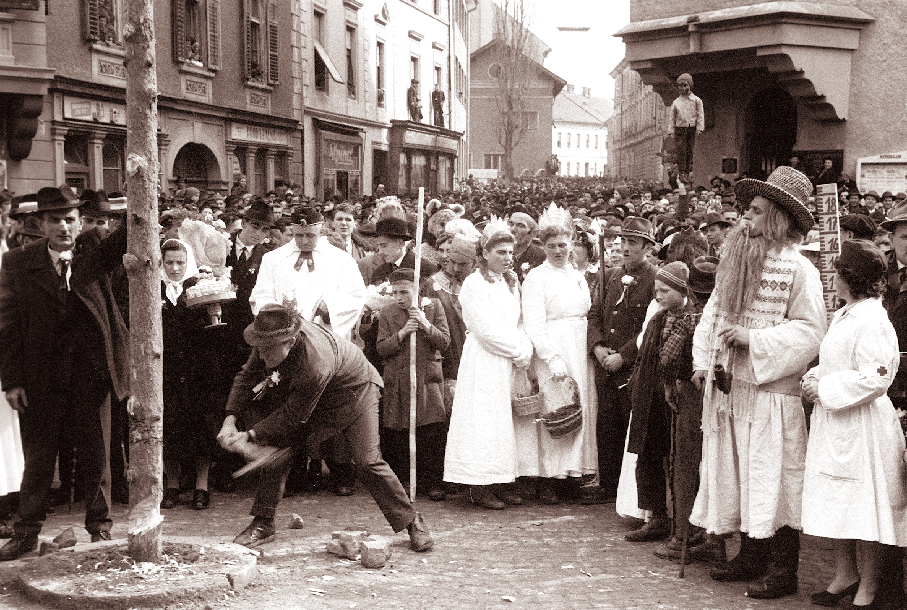 Pustni karneval v Ptuju - borovo gostüvanje